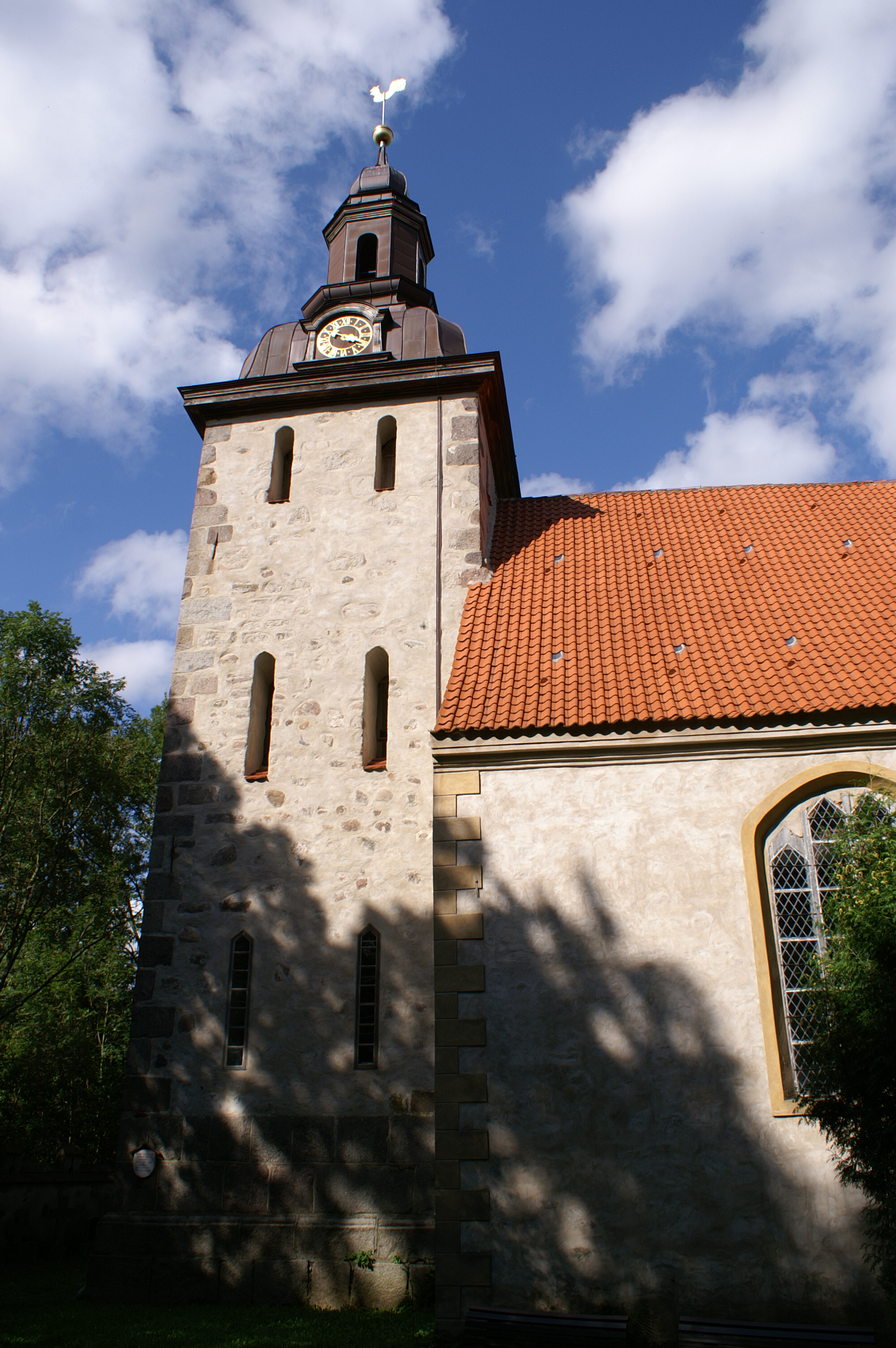 Nehringen, Landkreis Nordvorpommern, St. Andreas-Kirche, Südseite des Turmes